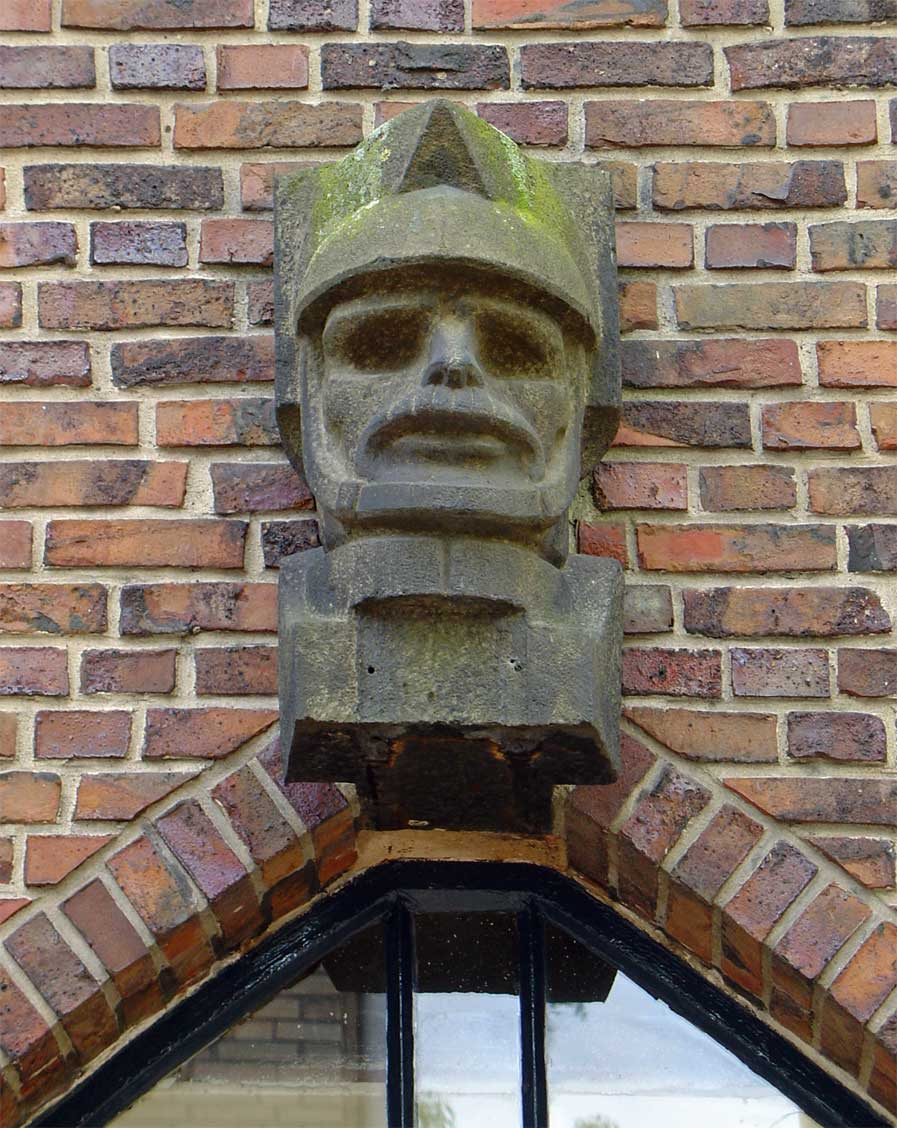 Politieagent door Willem Valk Groningen